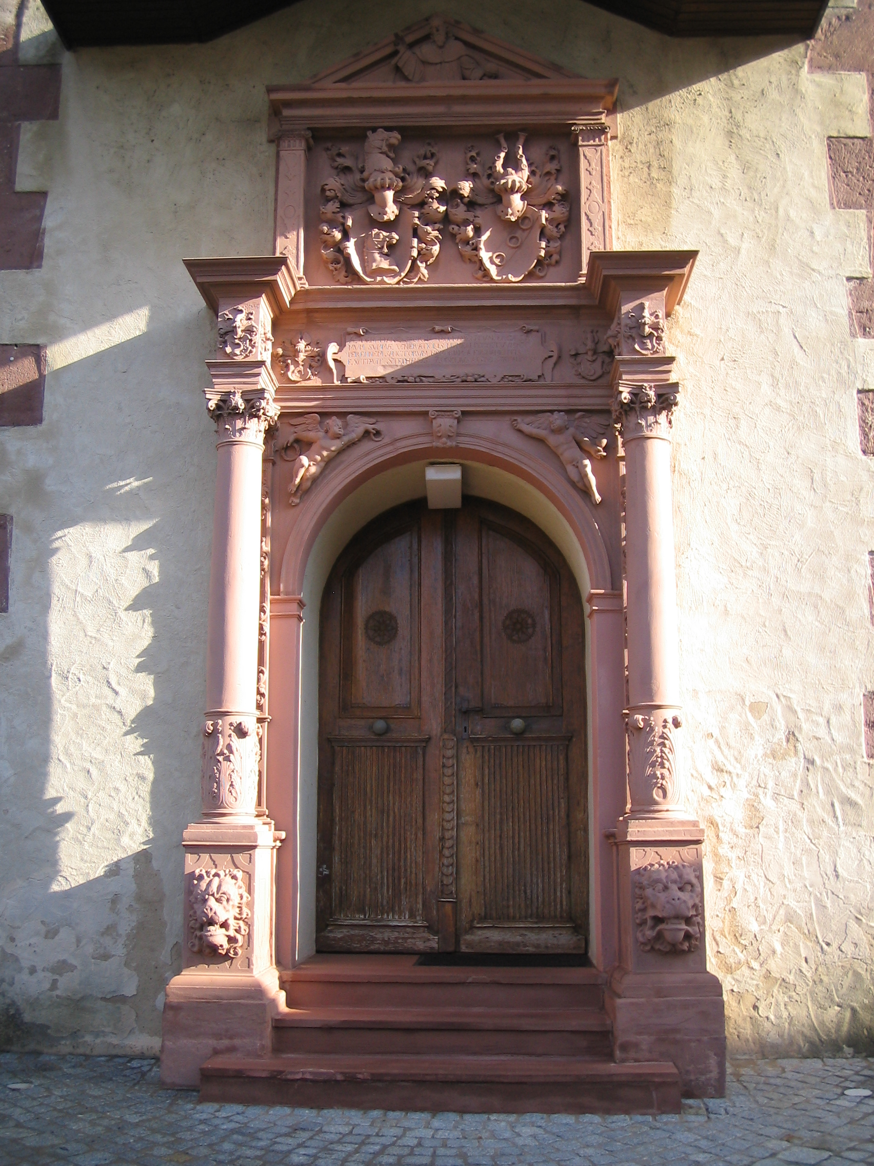 Portal der St.-Burkhard-Kirche Messelhausen wird Michael Juncker d.Ä. zugeschrieben